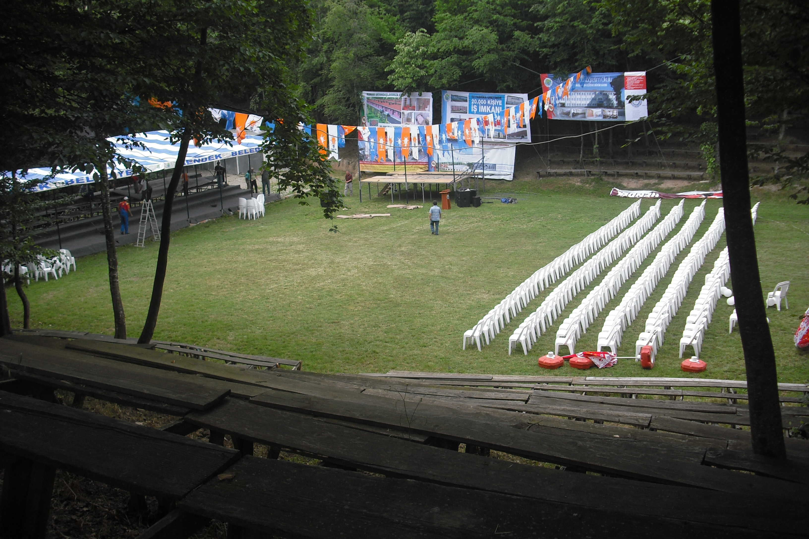 Salman Dede piknik alanı, güreş sahası.